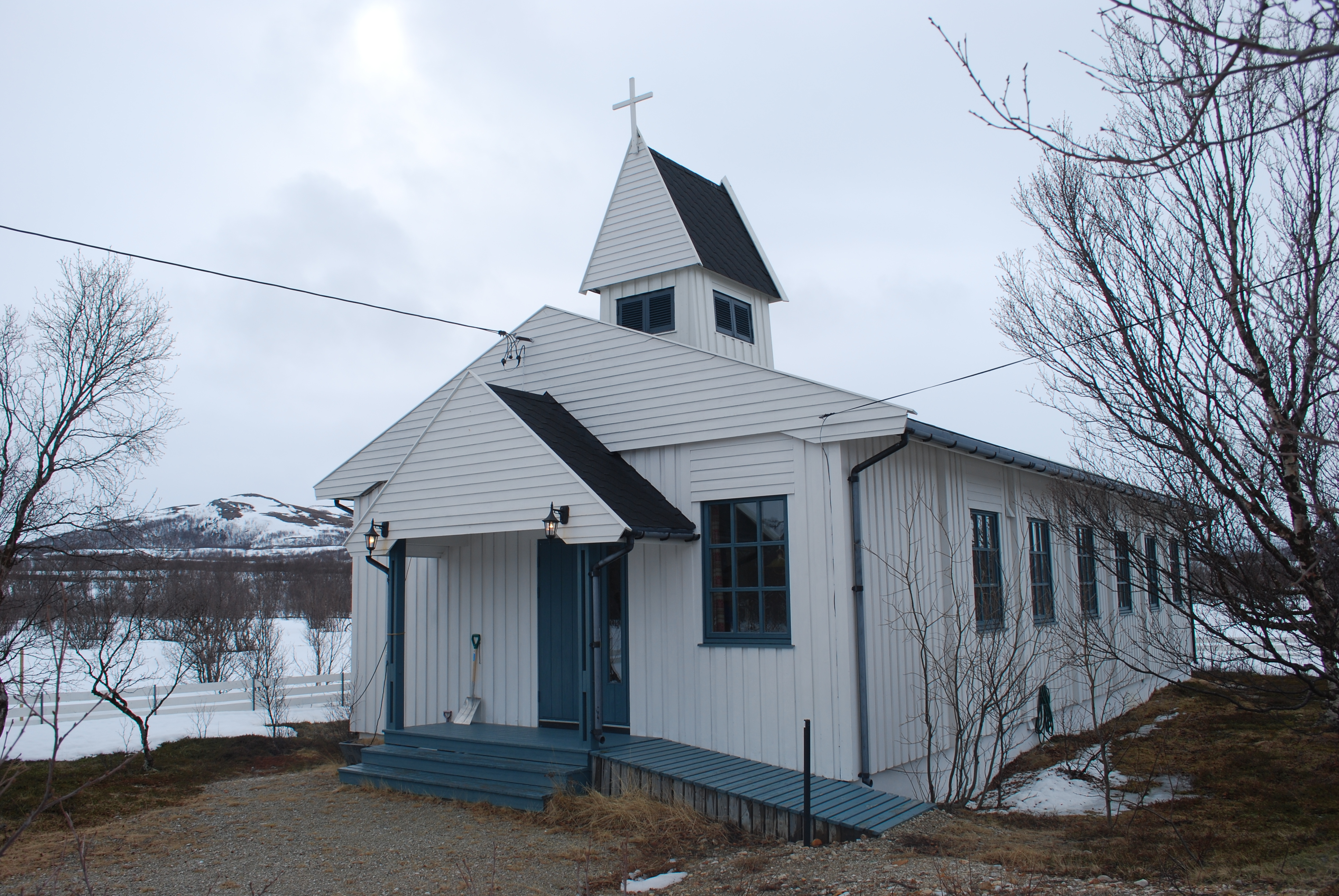 Veidnes kapell, Veidnes, Lebesby kommune, Finnmark